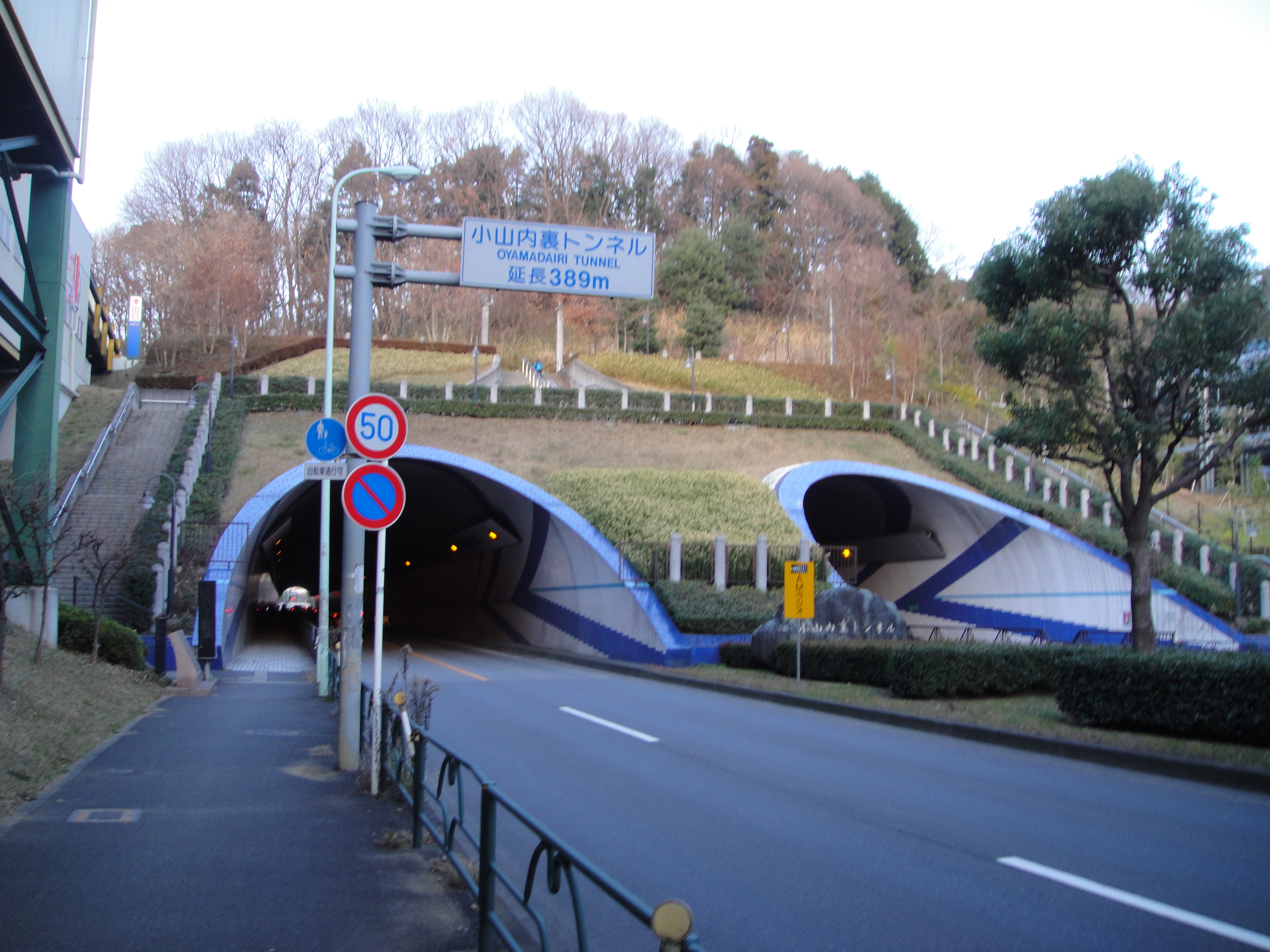 東京都の小山内裏トンネル